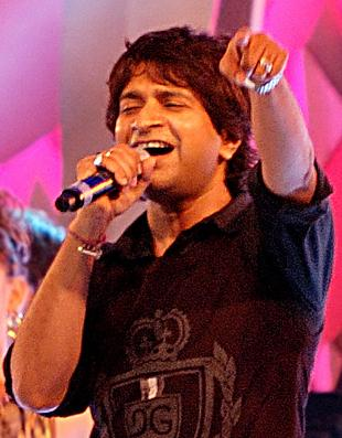 Krishna Kumar Kunnath is an Indian playback singer.